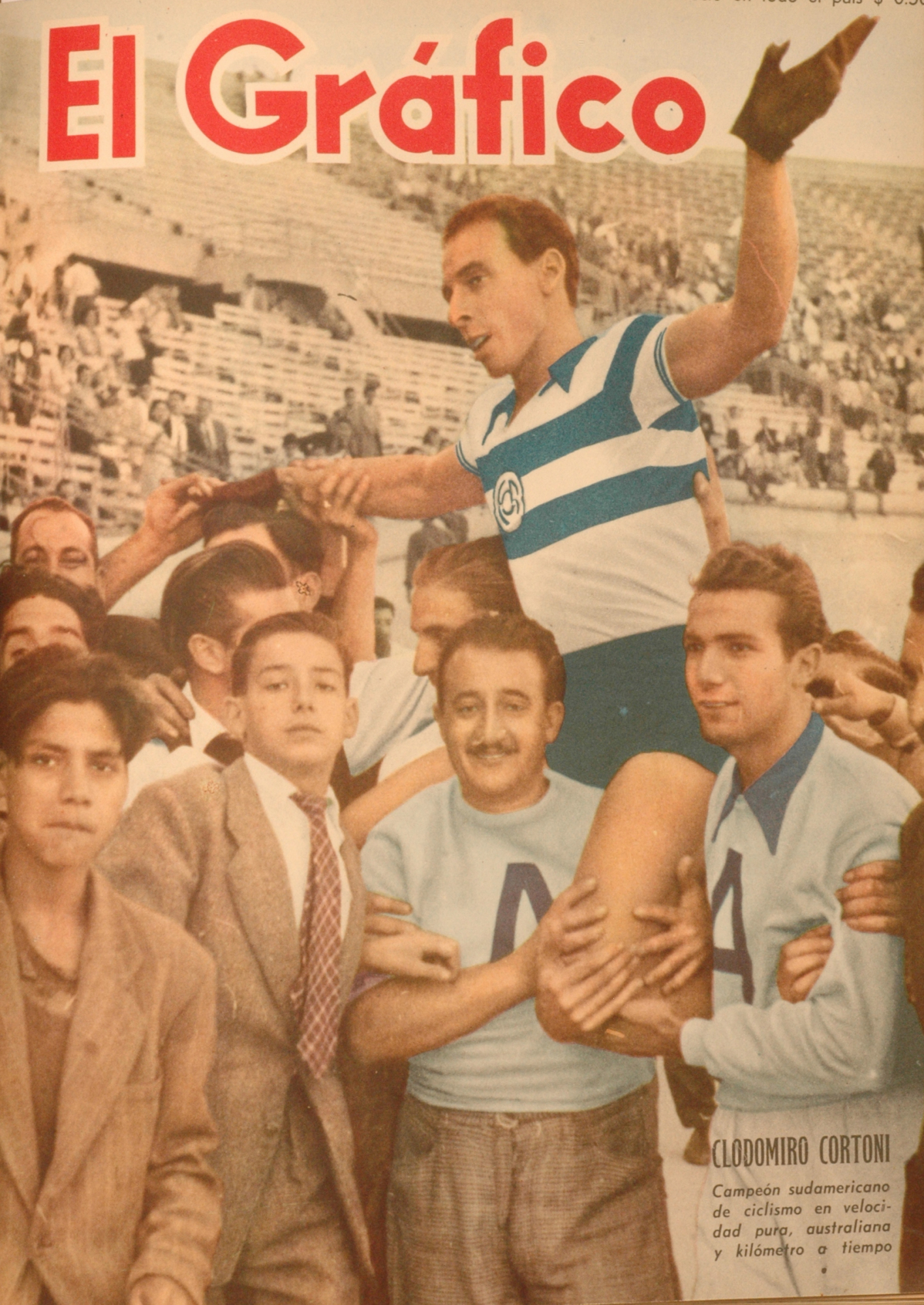 El Grafico del 17 de Marzo de 1950. Edicion 1597